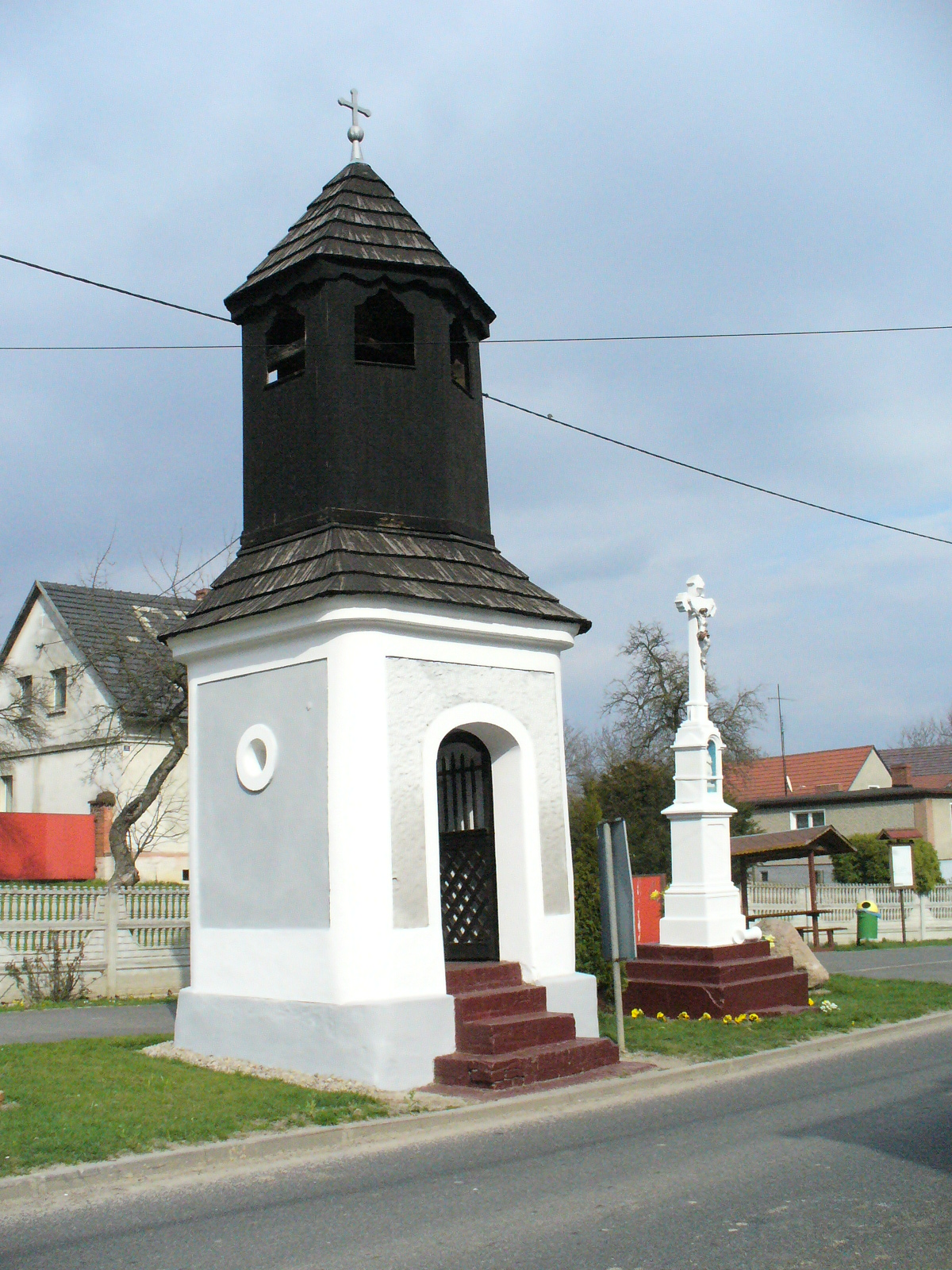 Lichinia - Lichynia - kapliczka drewniano - murowana